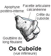 Cuboide droit. Face inférieure